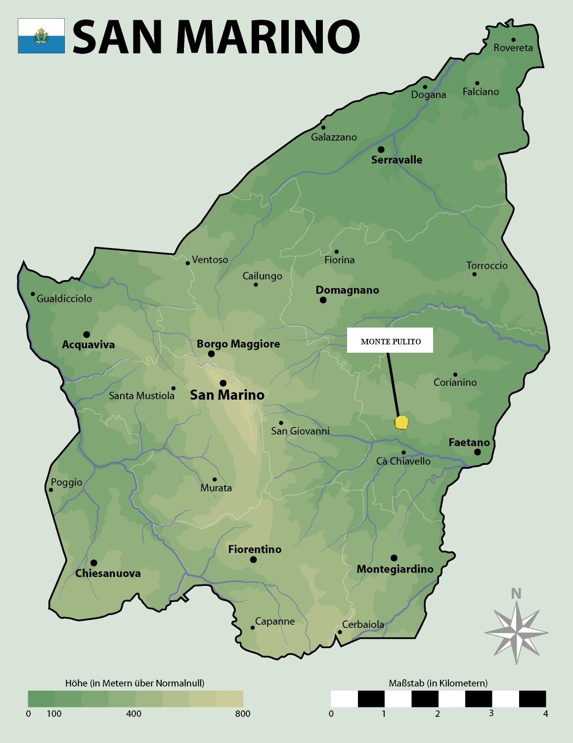 carta modificata da Andre86 di San Marino con indicazione di Monte Pulito